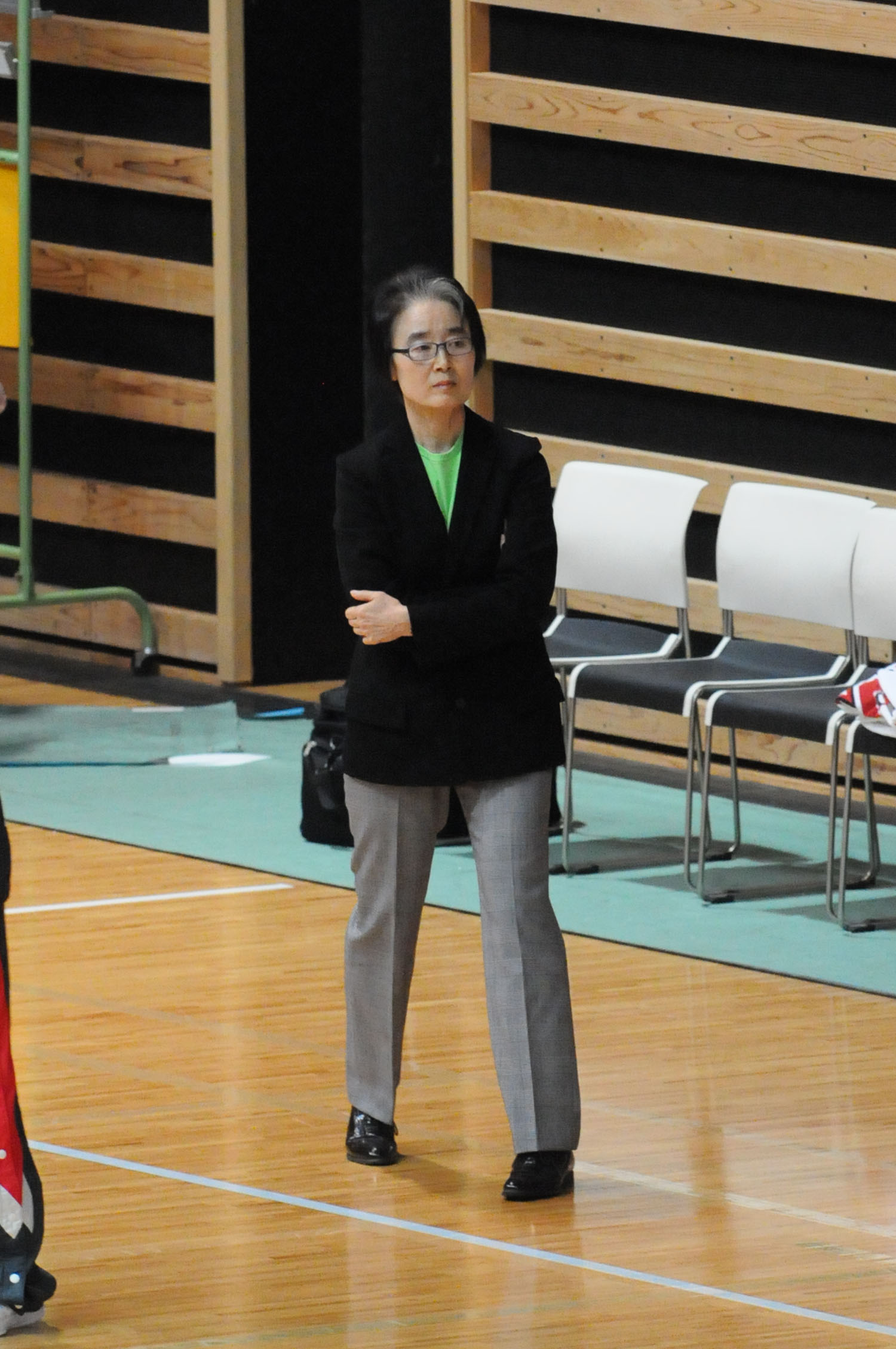 アイシン・エィ・ダブリュ ウィングス、李玉慈HC。大田区総合体育館で。